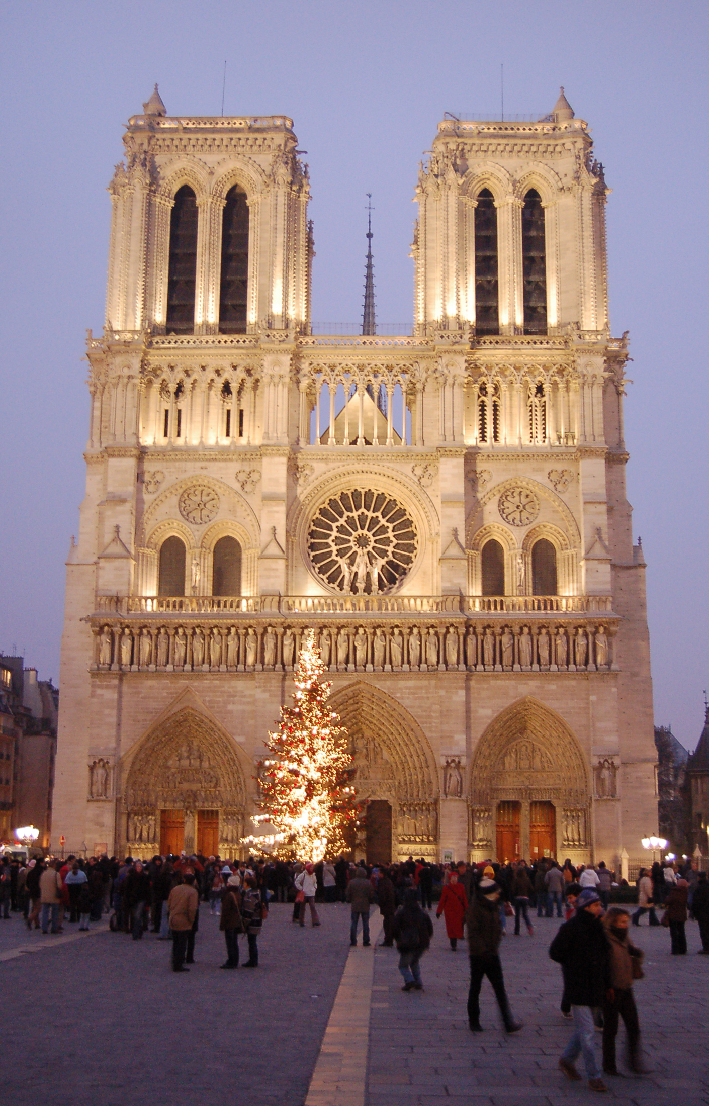 Notre-Dame de Paris, Noël 2006